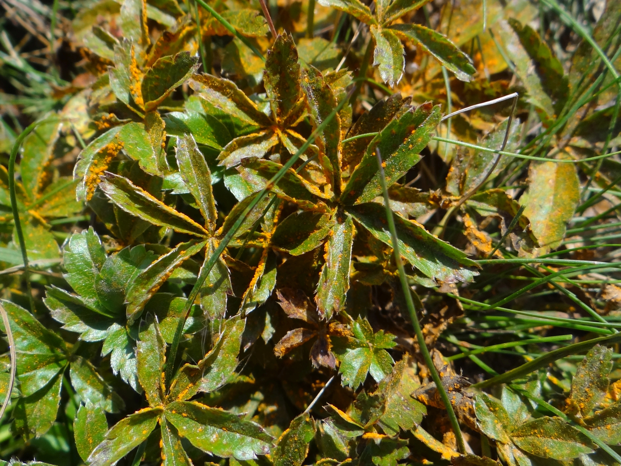 Phragmidium potentillae on leaf Potentilla alpina. Location: Slovakia, Nízke Tatry, Veľká hoľa